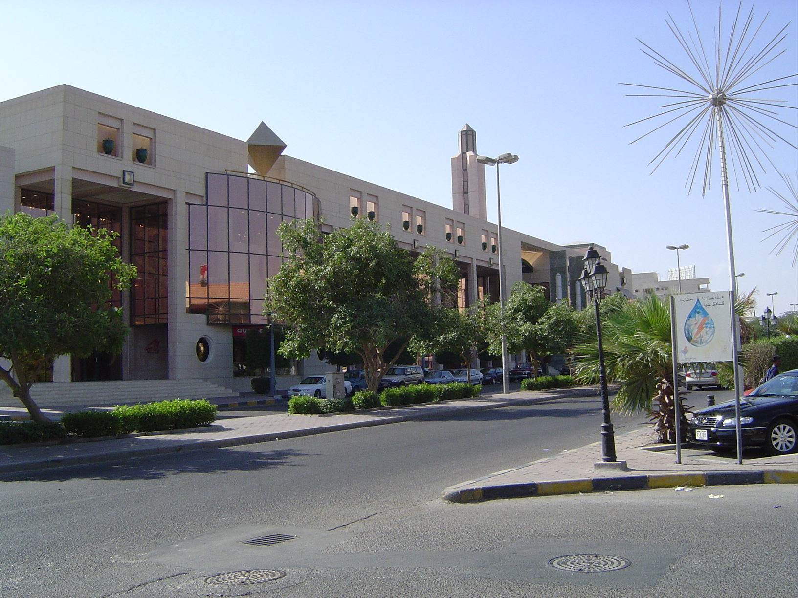 in kuwait